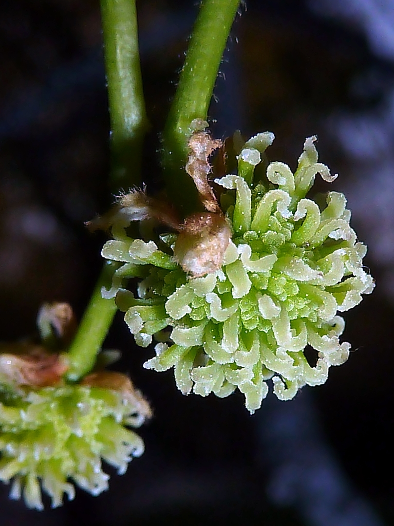 Liquidambar styracyflua (liquidambar americano) : Inflorescencia feminina in situ - Parque del Buen Retiro, Madrid (España).